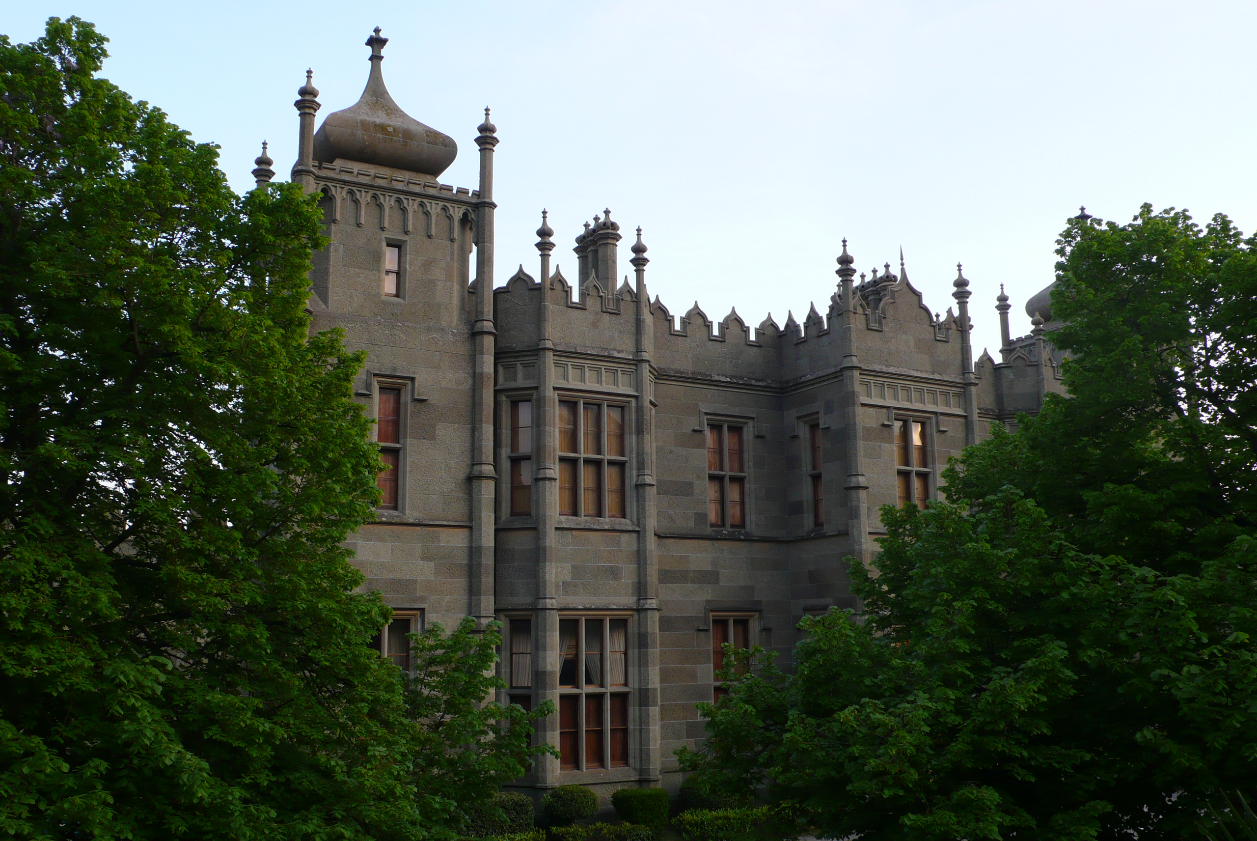 Воронцовский дворец (Алупка)